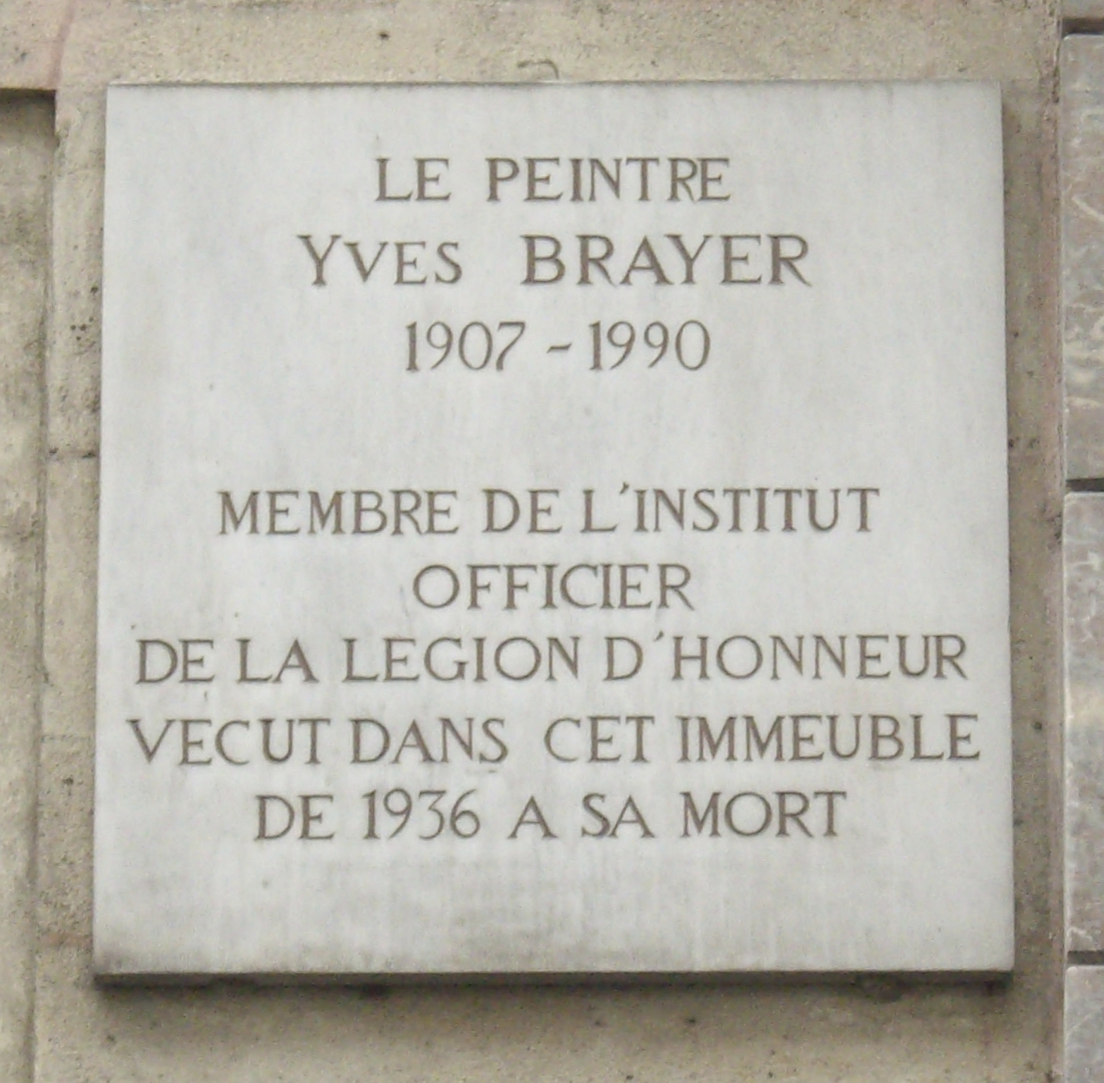 Plaque commémorative, 22 rue Monsieur-le-Prince, Paris 6e. « Le peintre Yves Brayer, 1907-1990, membre de l'Institut, officier de la Légion d'honneur, vécut dans cet immeuble de 1936 à sa mort. »